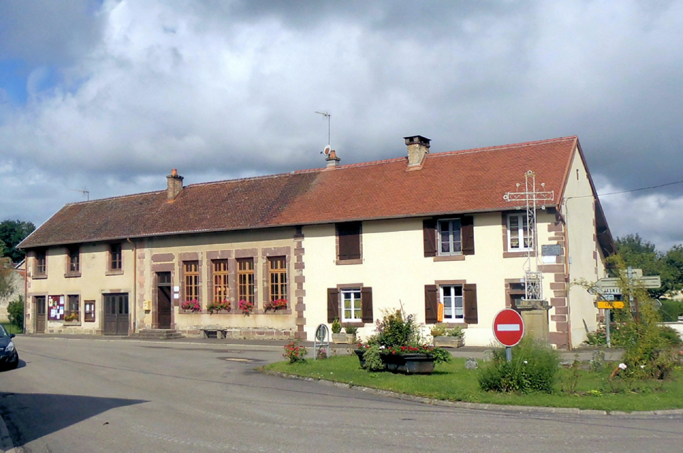 La mairie-école d'Anjeux